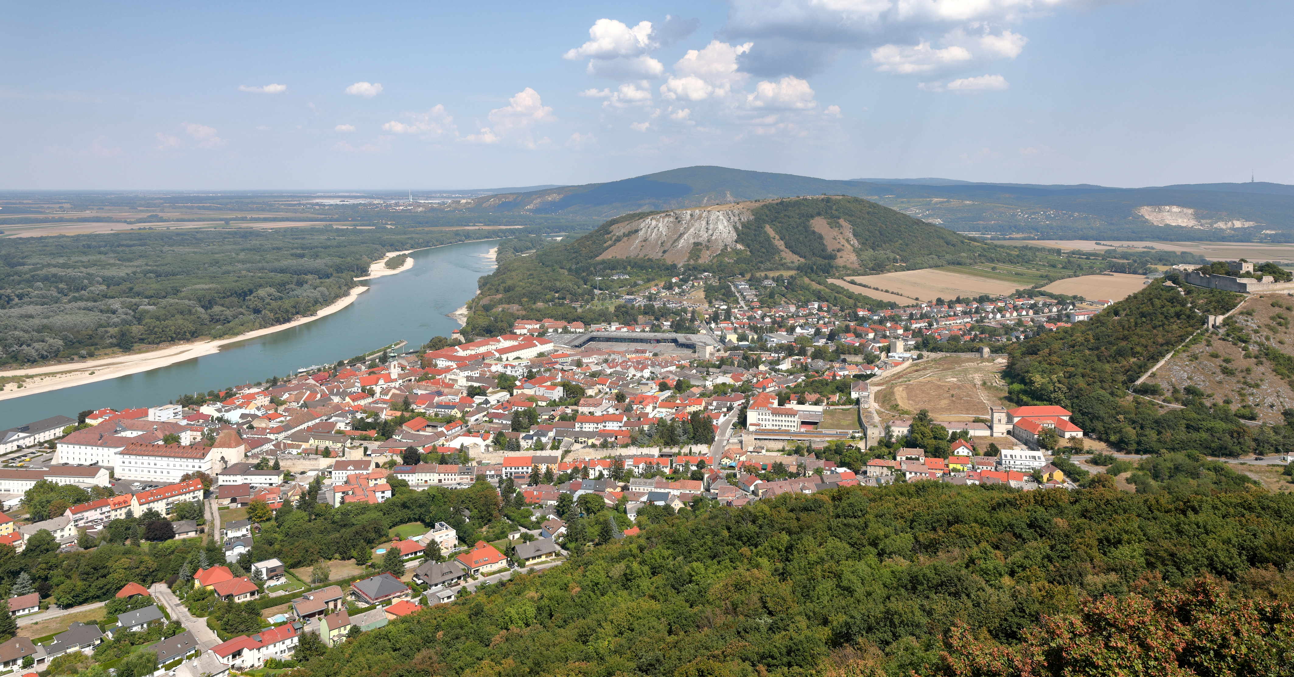 Blick vom Hundsheimer Berg auf die niederösterreichische Stadtgemeinde Hainburg an der Donau. Links im Bild die Donau mit der Hainburger Au, ganz rechts der 291 m hohe Schlossberg mit der Heimenburg, hinter Hainburg (Bildmitte) der 346 m hohe Braunsberg und hinter diesem der 514 m hohe Thebener Kogel (Devínska Kobyla).